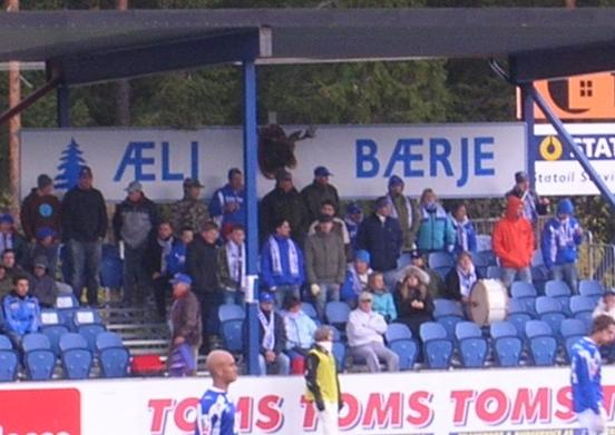 Norsk (bokmål): Nybergsundsupportere i hjemmekampen mot FKH i 2008.